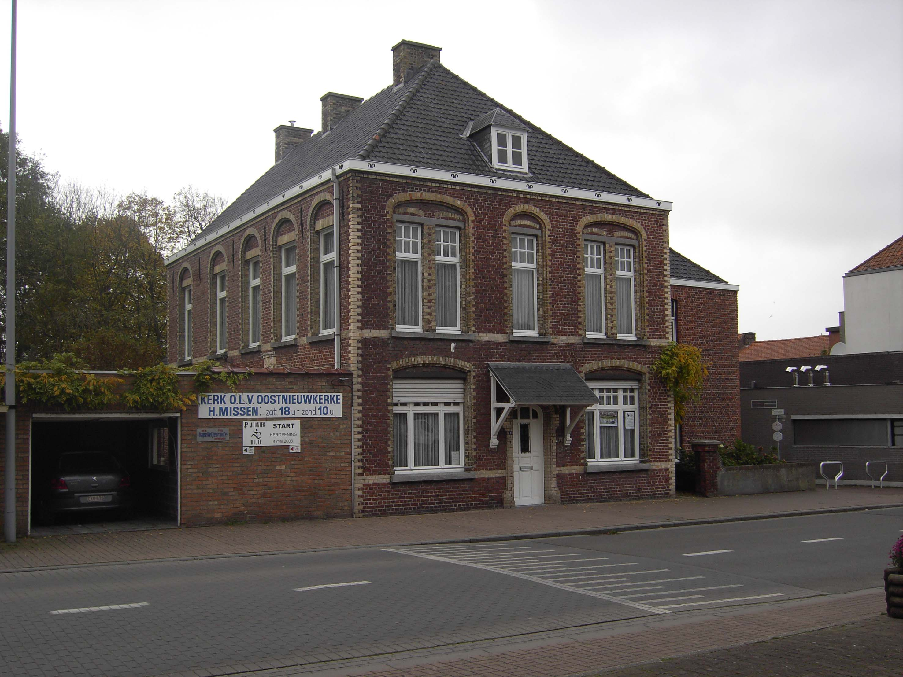 Voormalige pastorie - Dorpsplein - Oostnieuwkerke - Staden - West-Vlaanderen - België